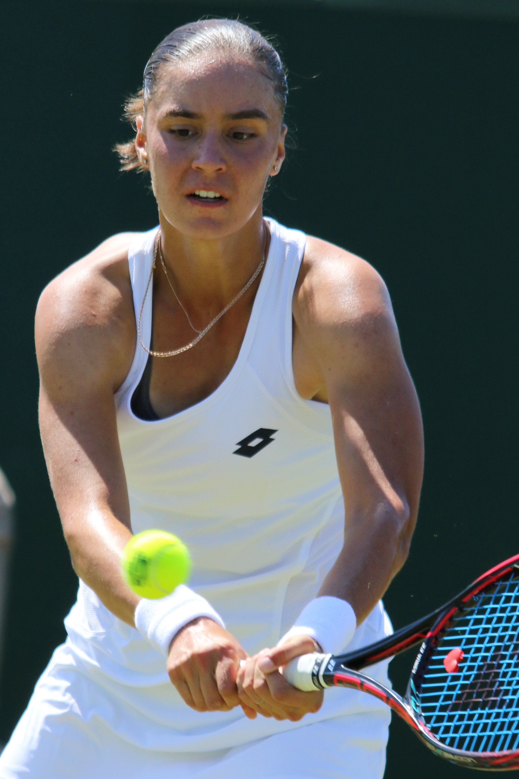 Kalinina WMQ18 (9)